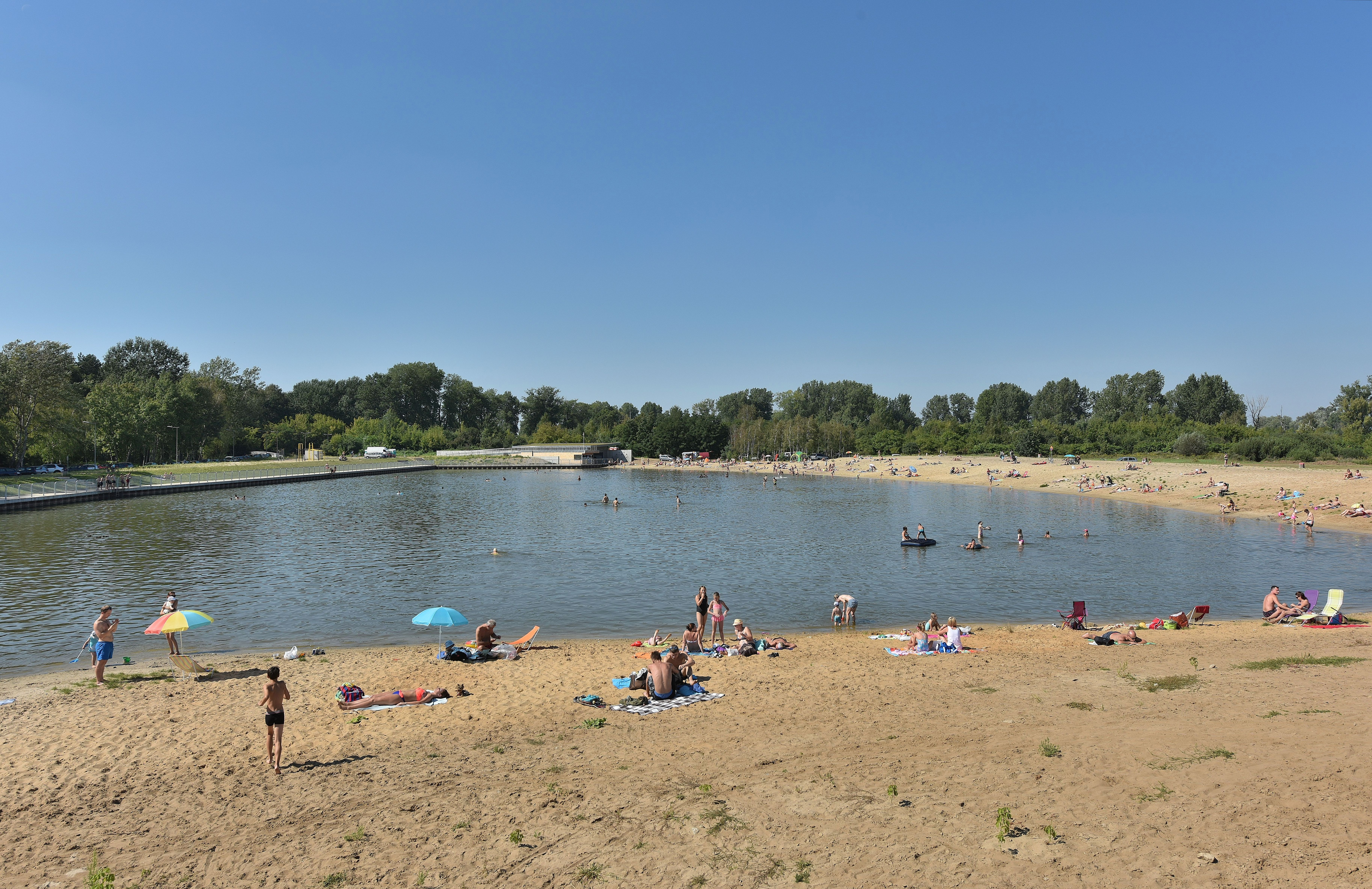 Zalew Bardowskiego w Warszawie (Elsnerów w dzielnicy Targówek)